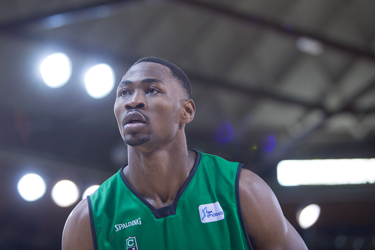 Omari Gudul amb la samarreta del Joventut de Badalona en la temporada 2017-18. Partit al Palau Blaugrana.